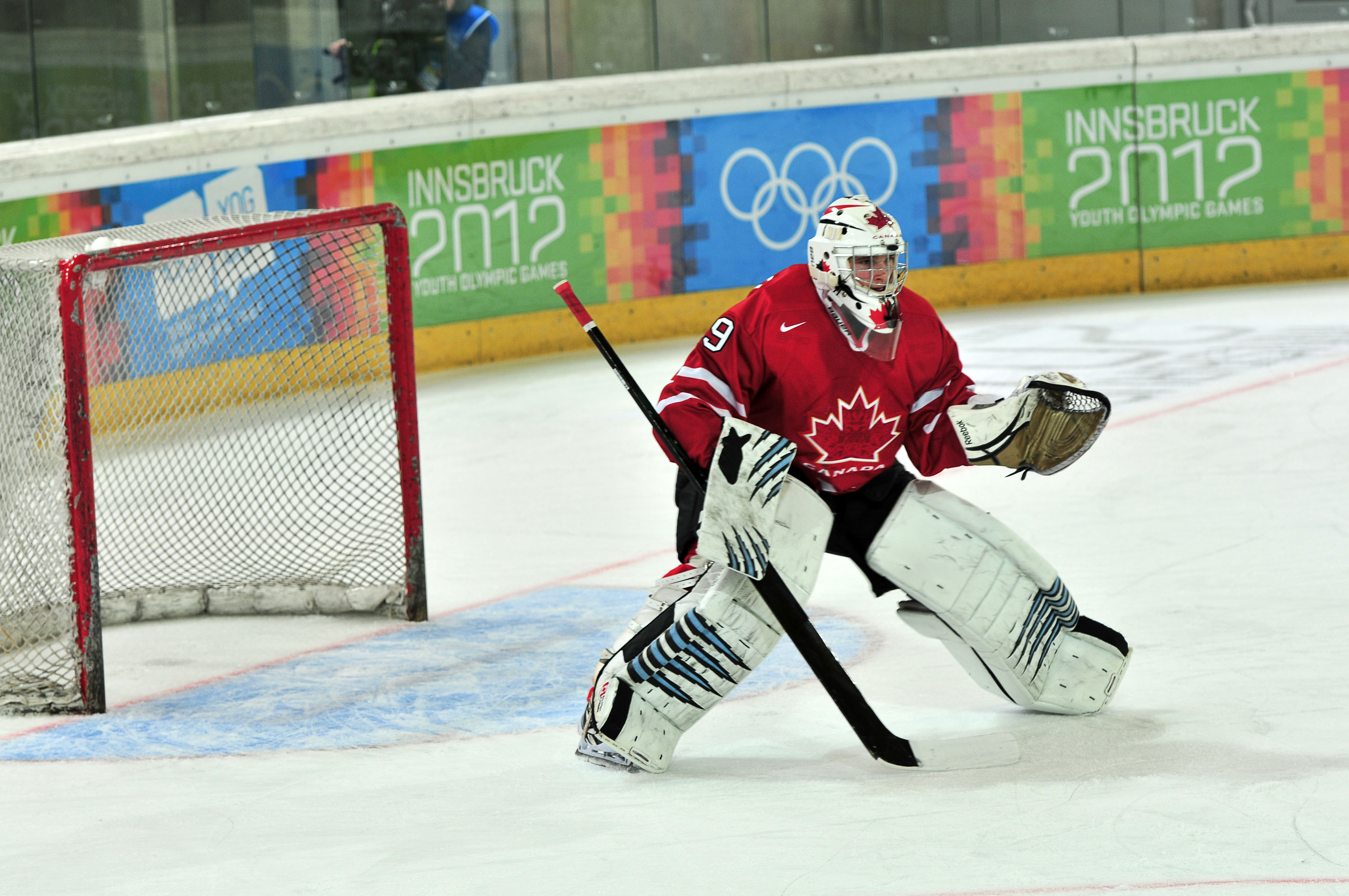 1. Jugendolympiade 2012 Innsbruck